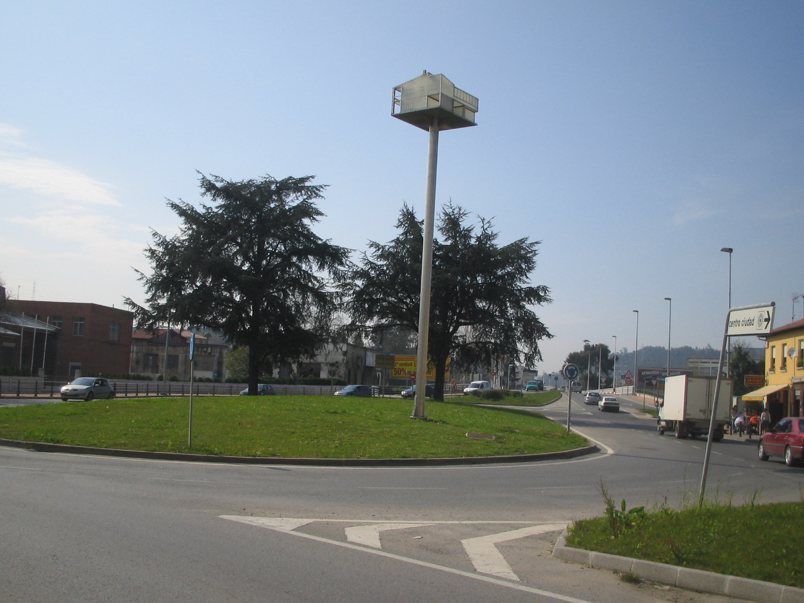 Rotonda de Torrelavega. Exhibe la escultura "Mi casa en Torrelavega", del artista catalán Jaume Plensa.